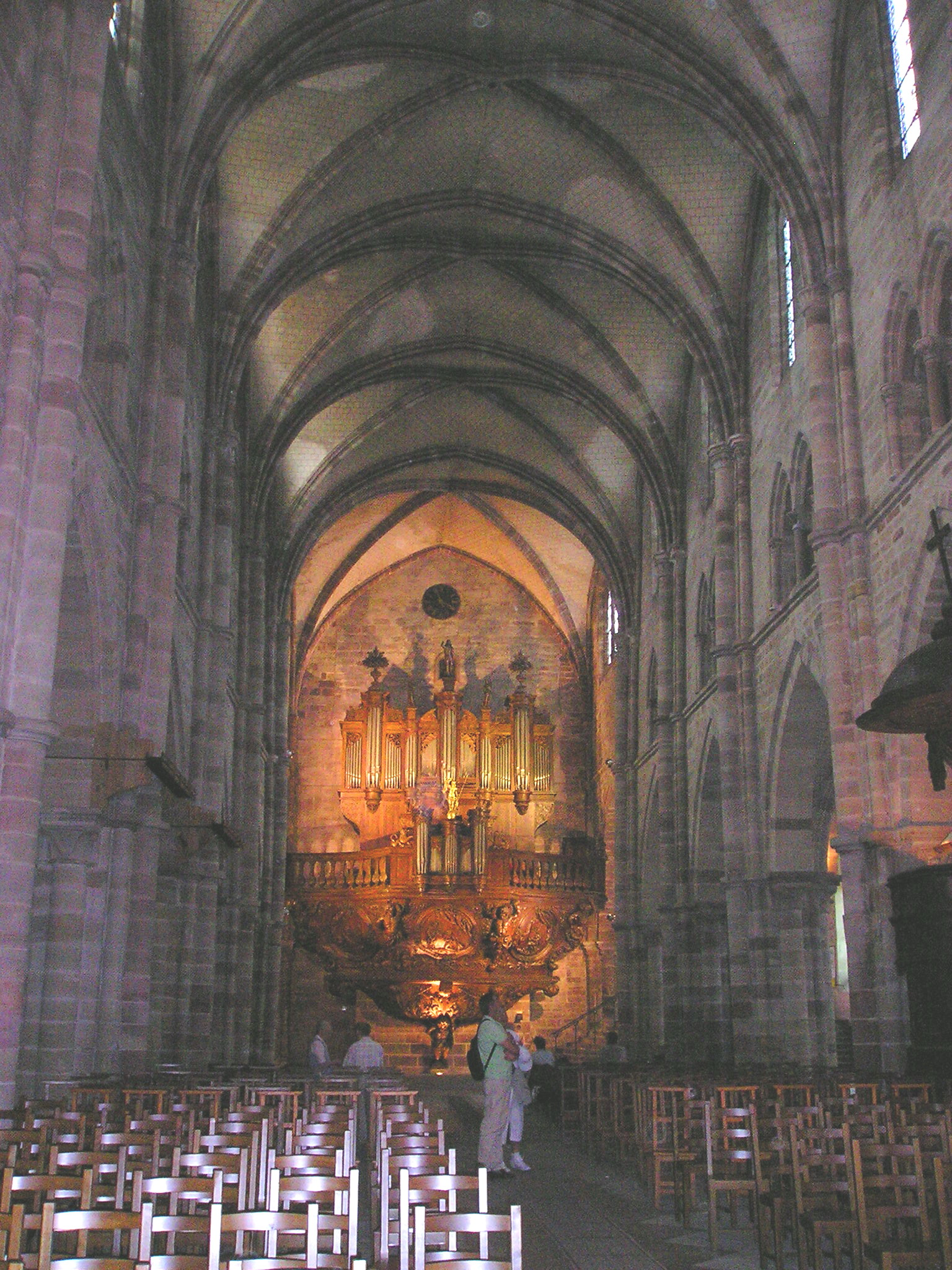 Luxeuil-les-Bains,_St-Colomban, Inneres mit Orgelprospekt